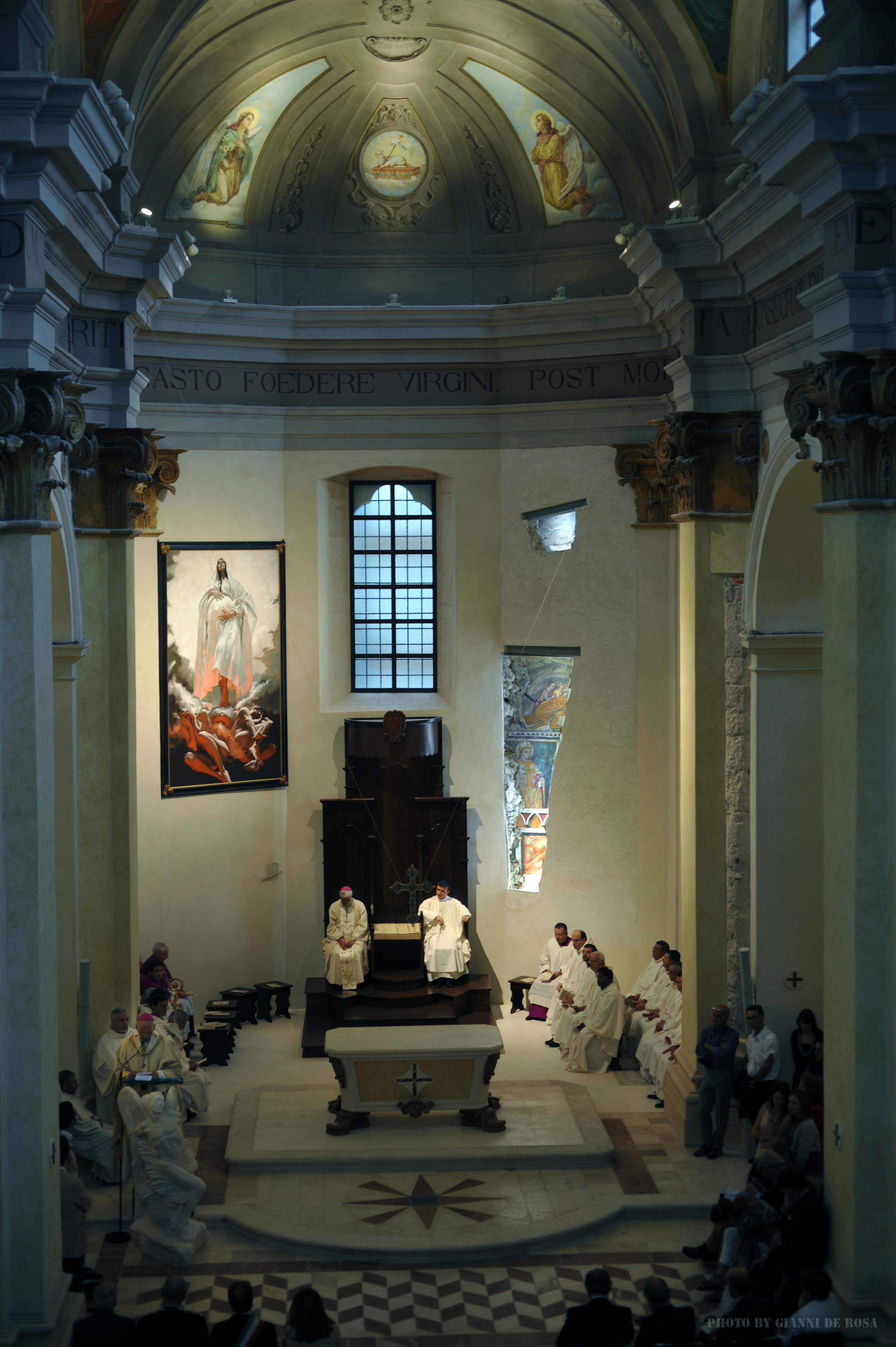 Chiesa parrocchiale di San Giuseppe Artigiano in L'Aquila